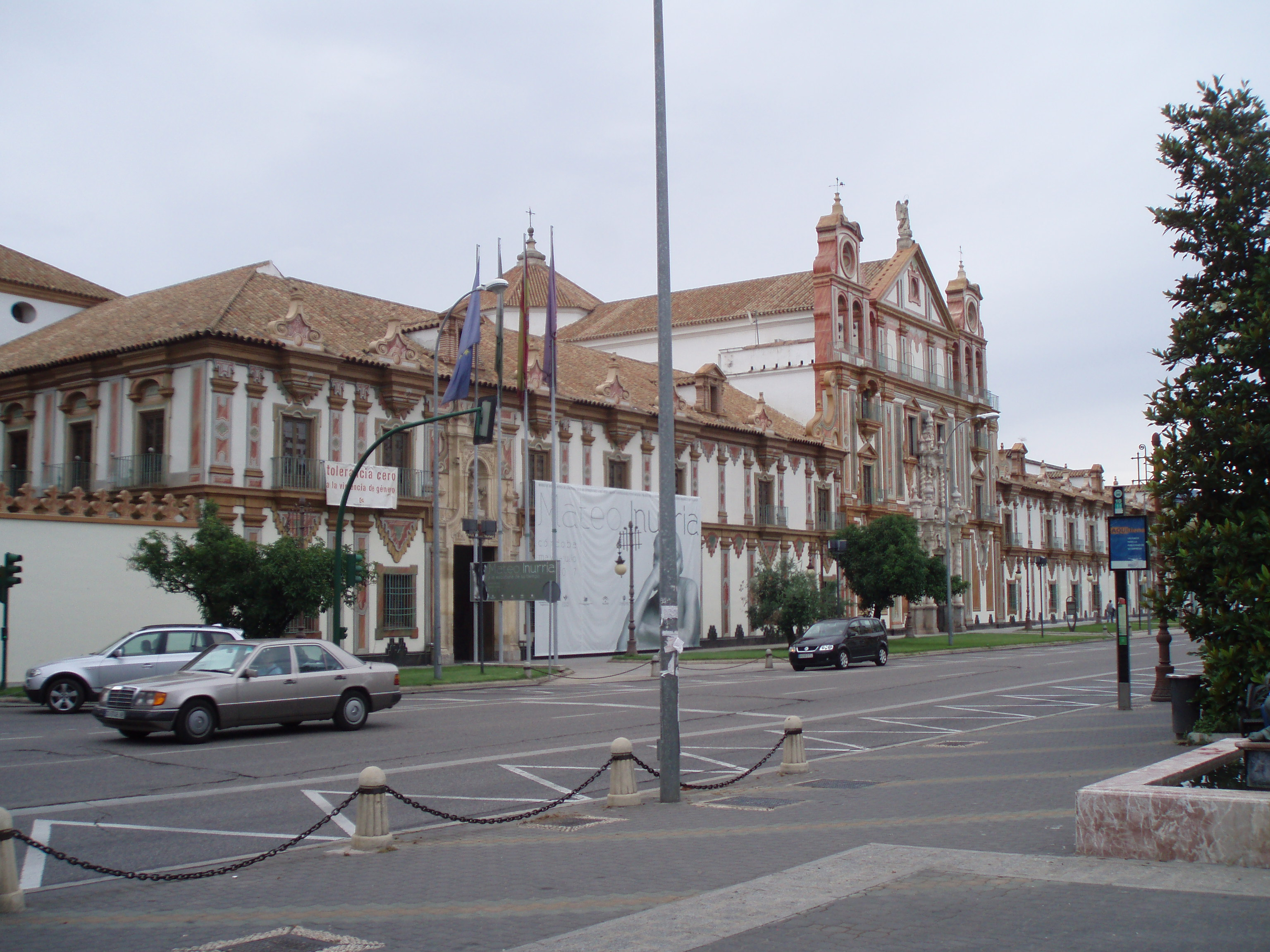 Vista de la fachada principal del antiguo Convento de la Merced de Córdoba, actual Diputación de Córdoba.